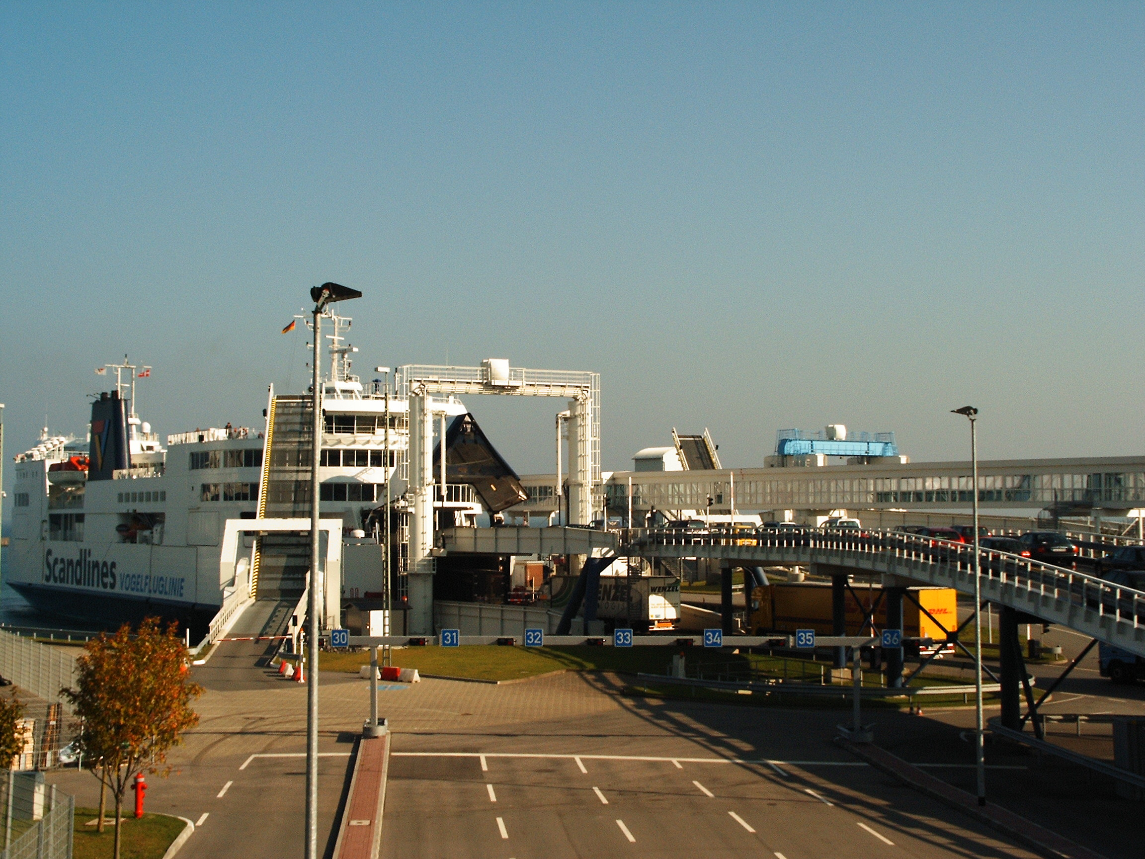 Fehmarn: Fährhafen Puttgarden